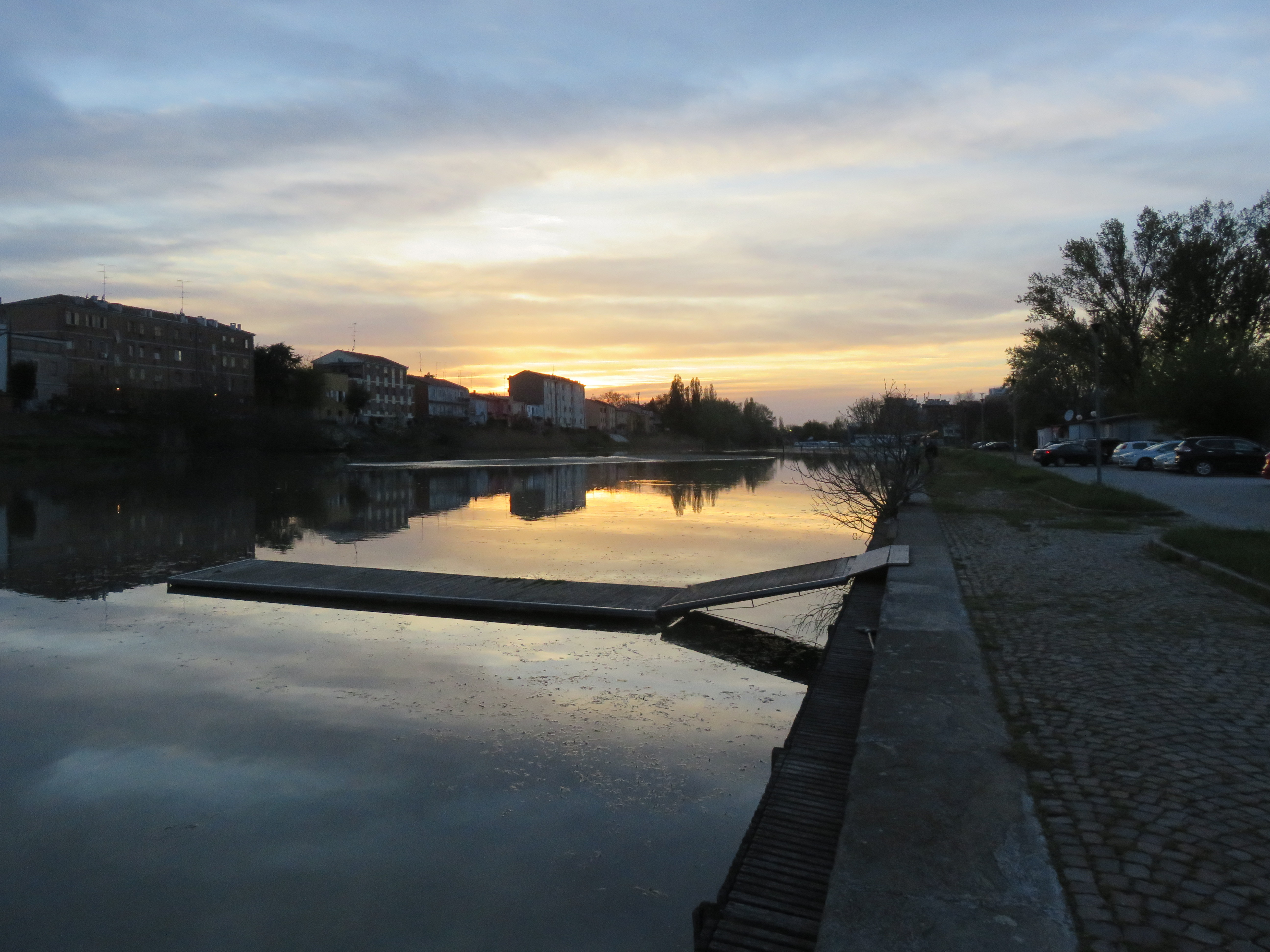 Il Po di Volano a Ferrara, nella zona della nave